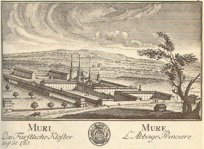 Ansicht des Klosters Muri im Jahr 1763, Topographie der Eydgnossschaft.